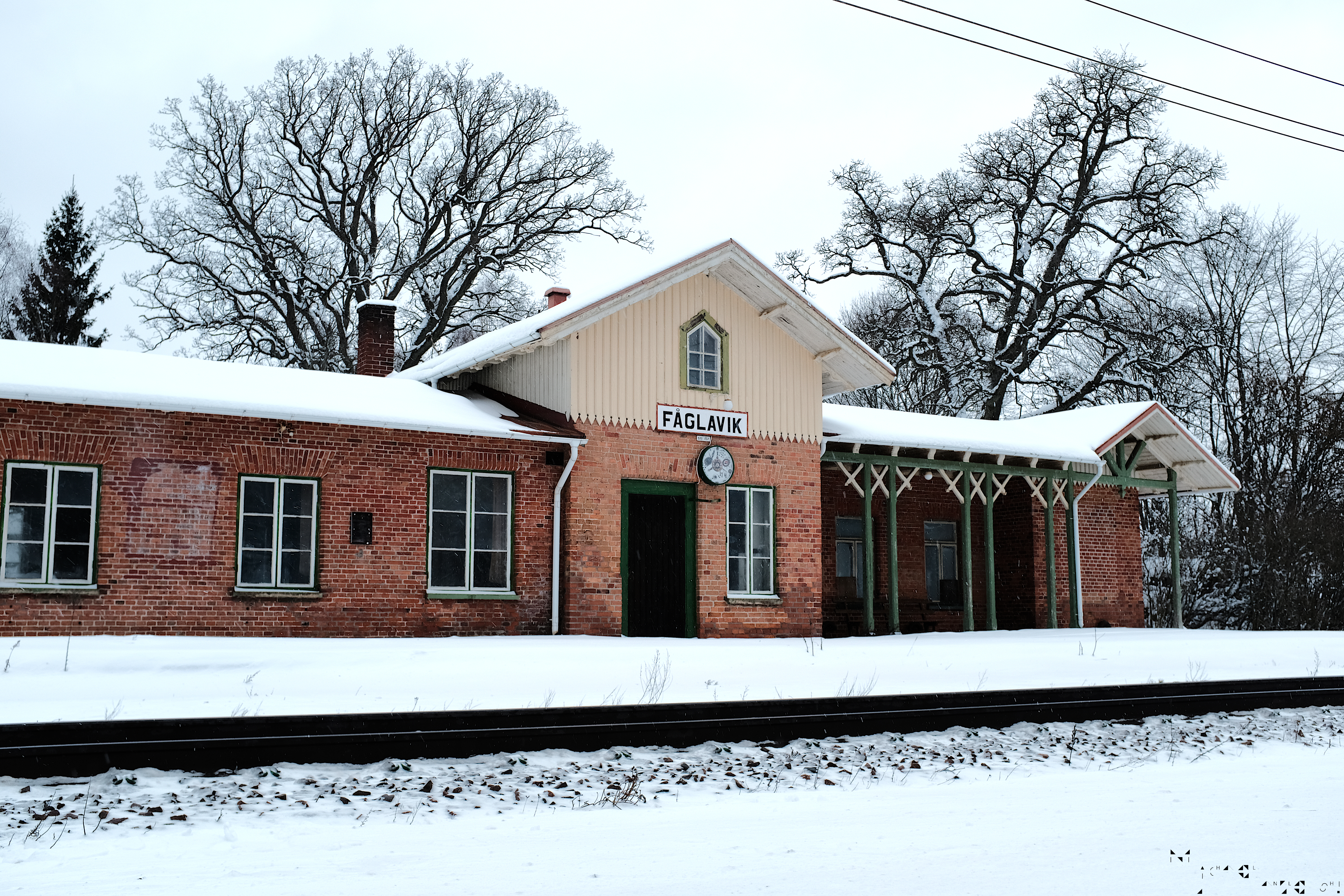 Fåglaviks Stationshus i februari 2019 med tillhörande stationsklocka [2017]